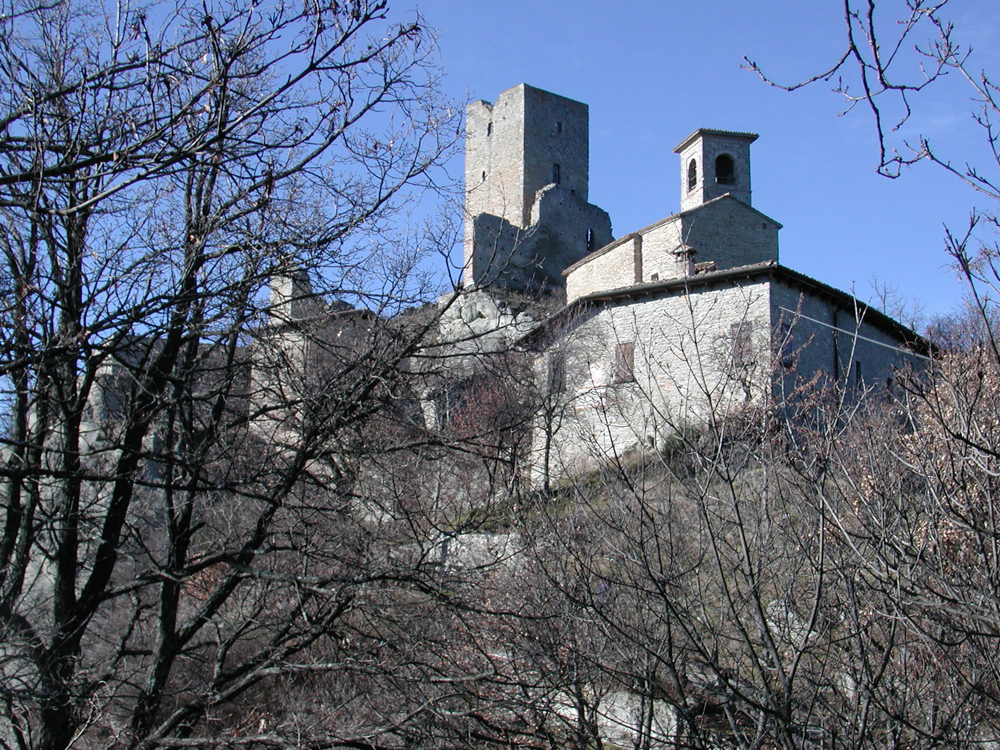 Castle of Carpineti, Carpineti, Appennino reggiano, Italy